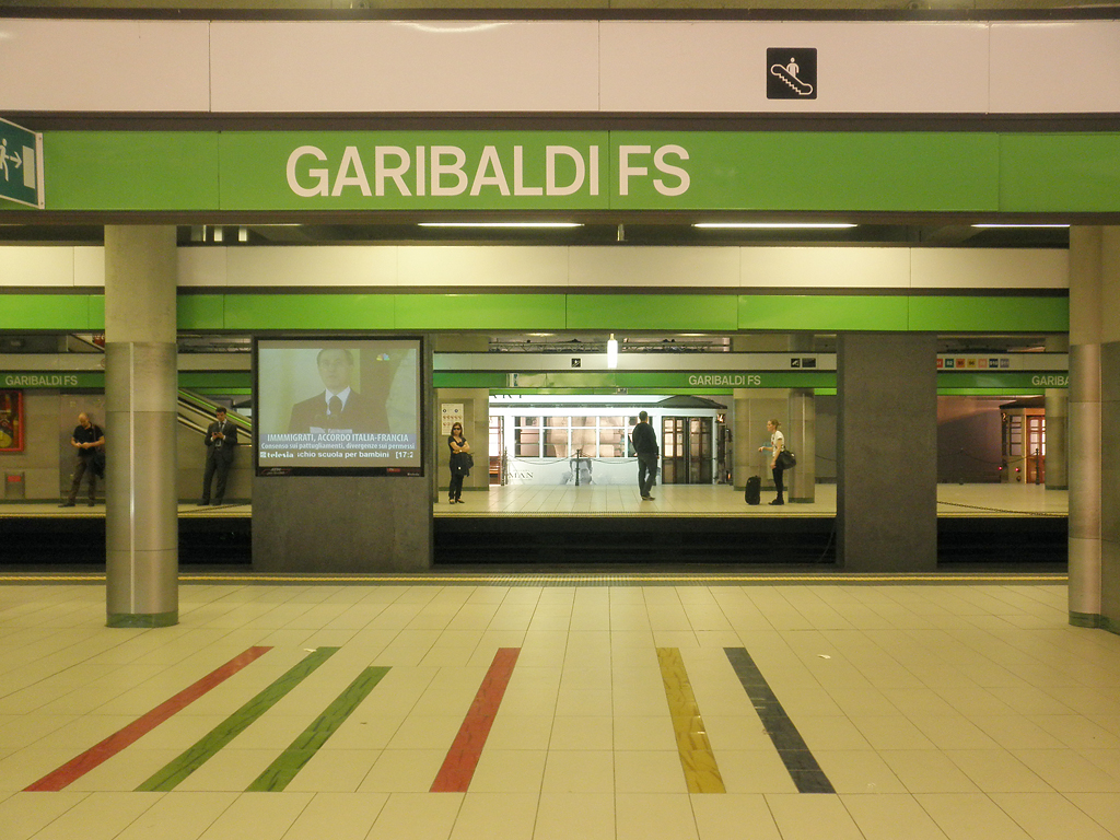 Milano, stazione di Garibaldi FS della metropolitana.